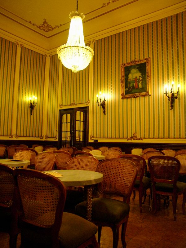 Művész Kávéház, Budapest, Hungary